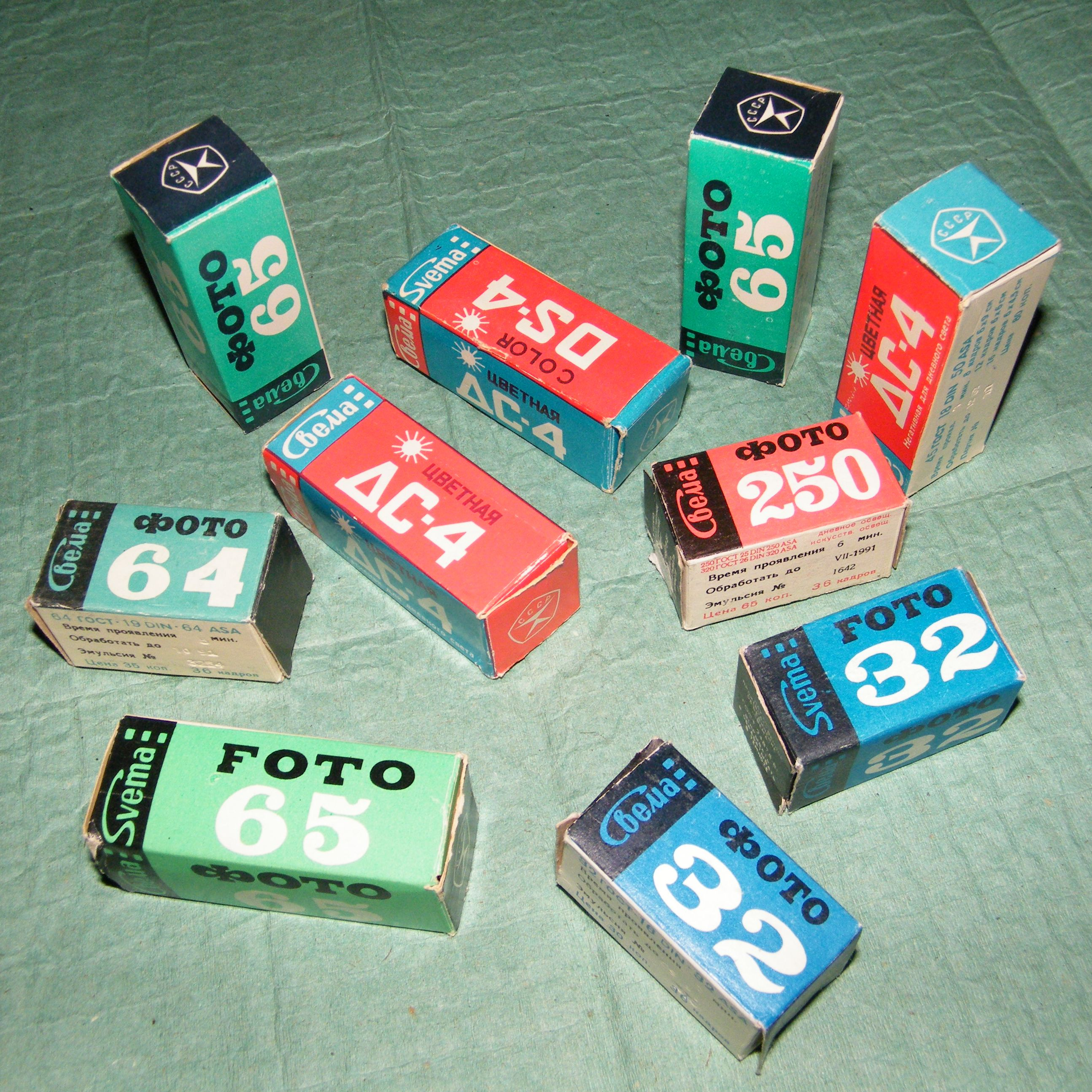 Фотоплёнка Свема